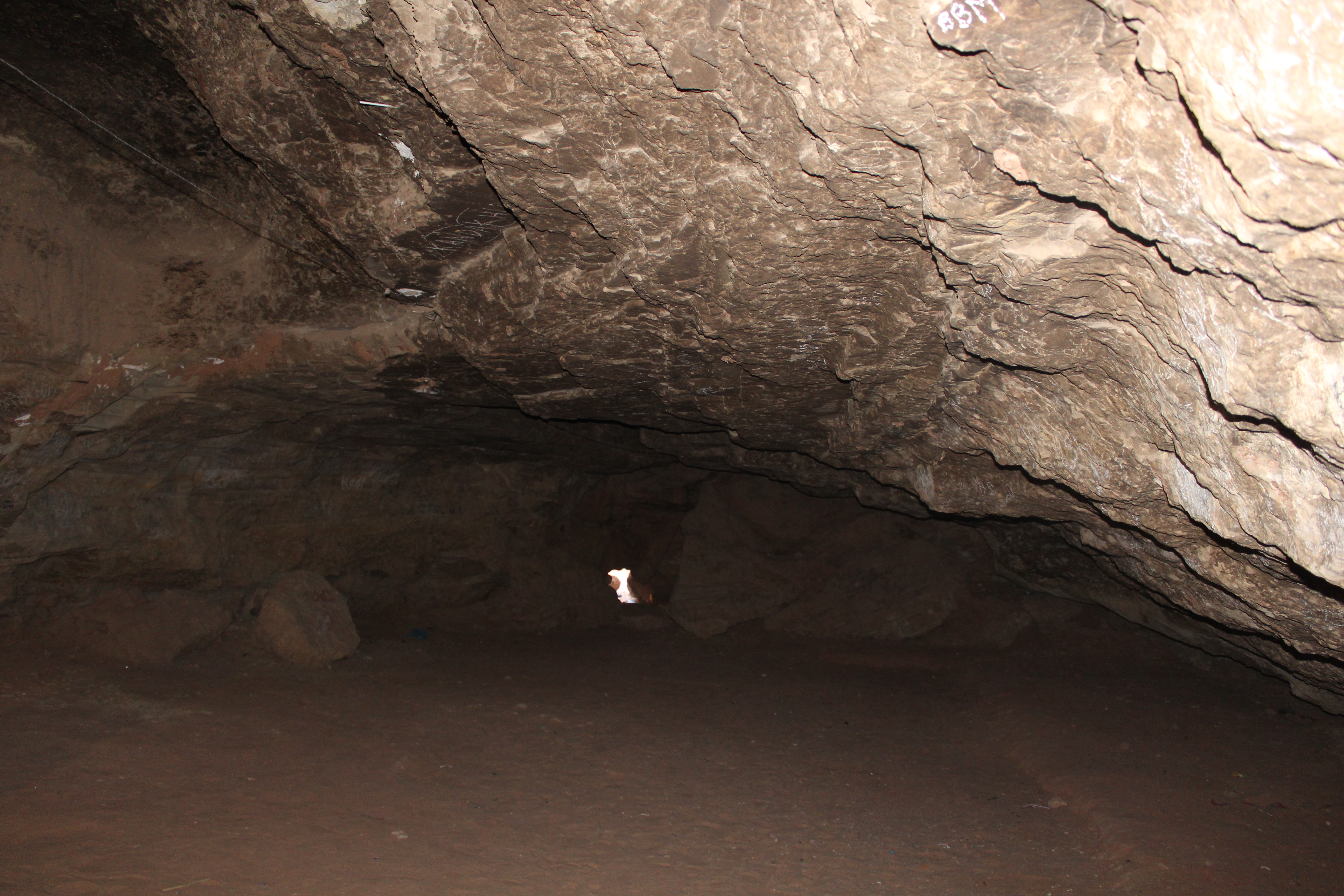 مغارة في قصر تماسخت، ولاية أدرار